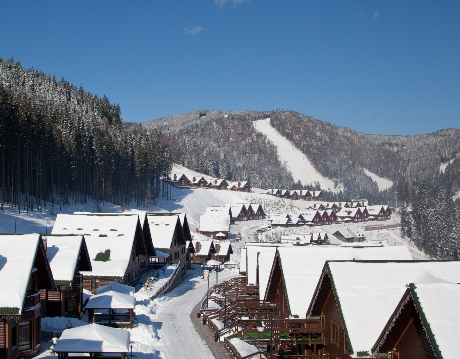 Вид на территорию курорта зимой